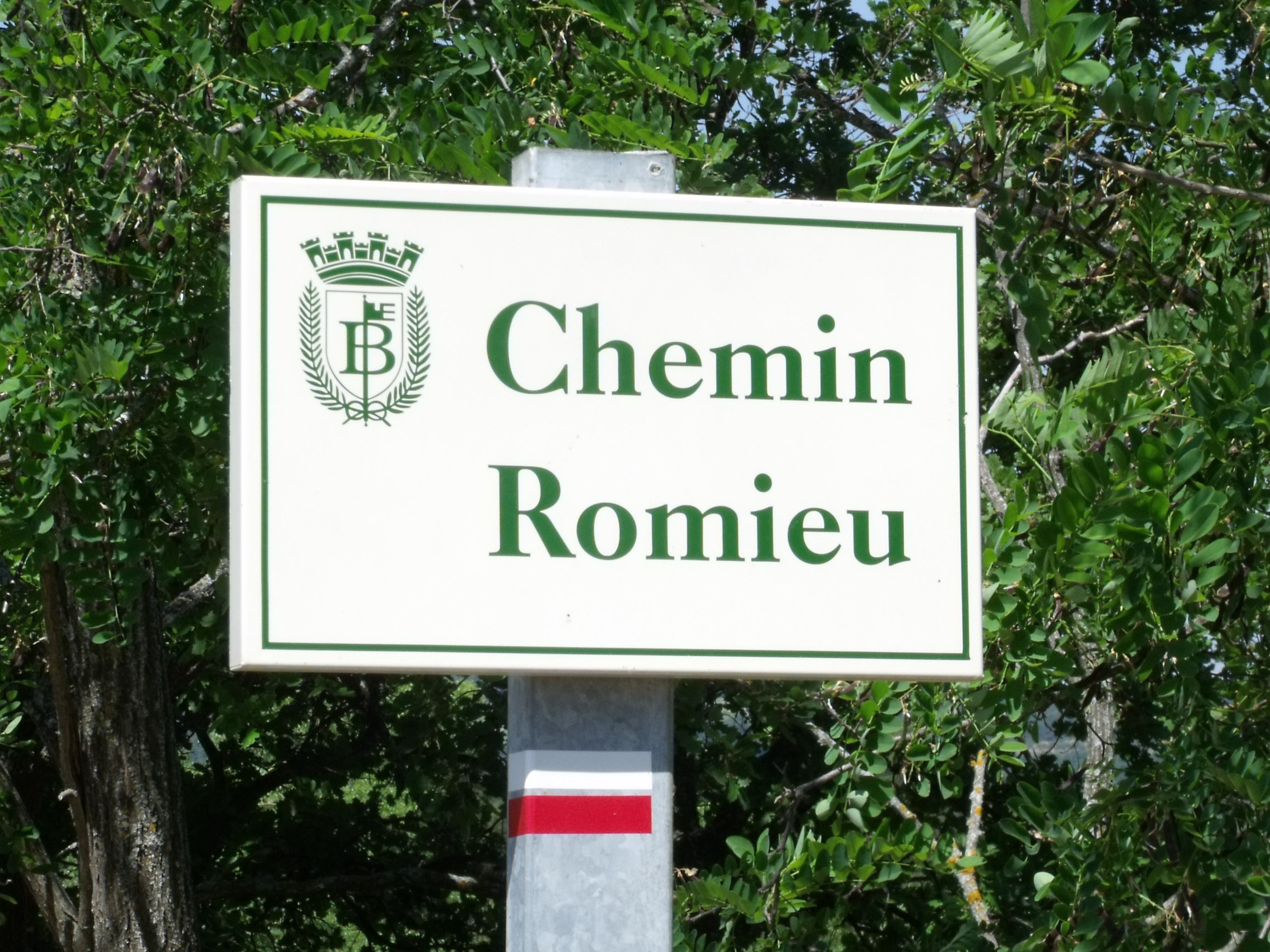 Chemin de pèlerinage empruntant la via Domitia près du pont Julien